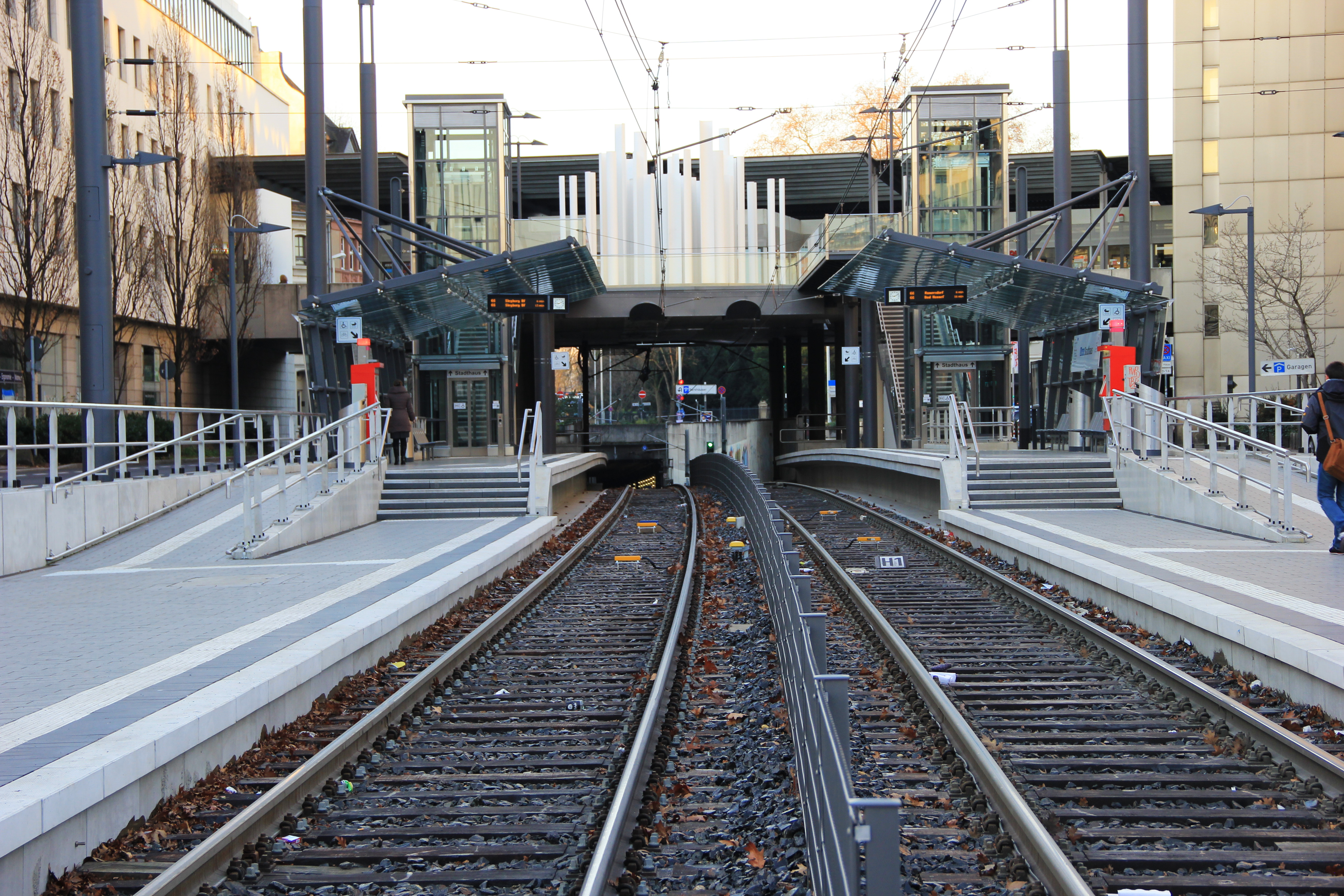 Stadtbahnhaltestelle Stadthaus